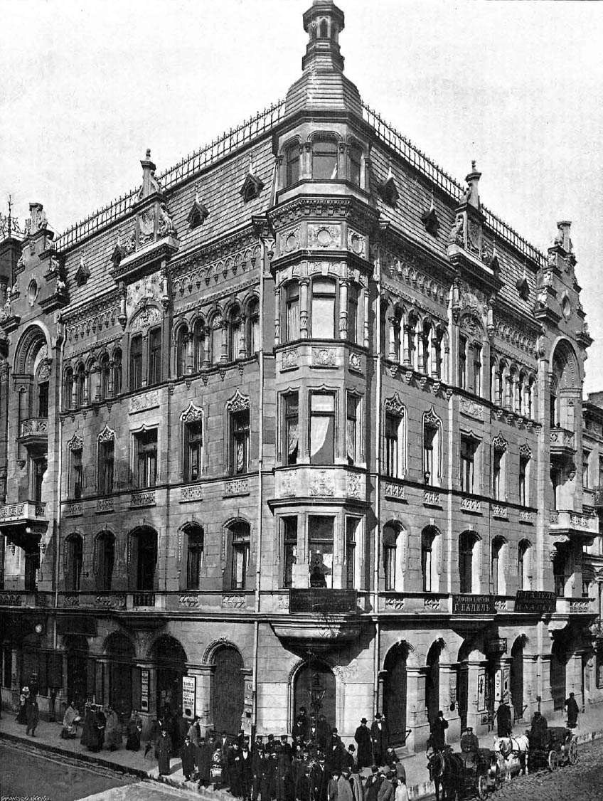 Житловий будинок у Лодзі. Архітектор Давид Ланде.